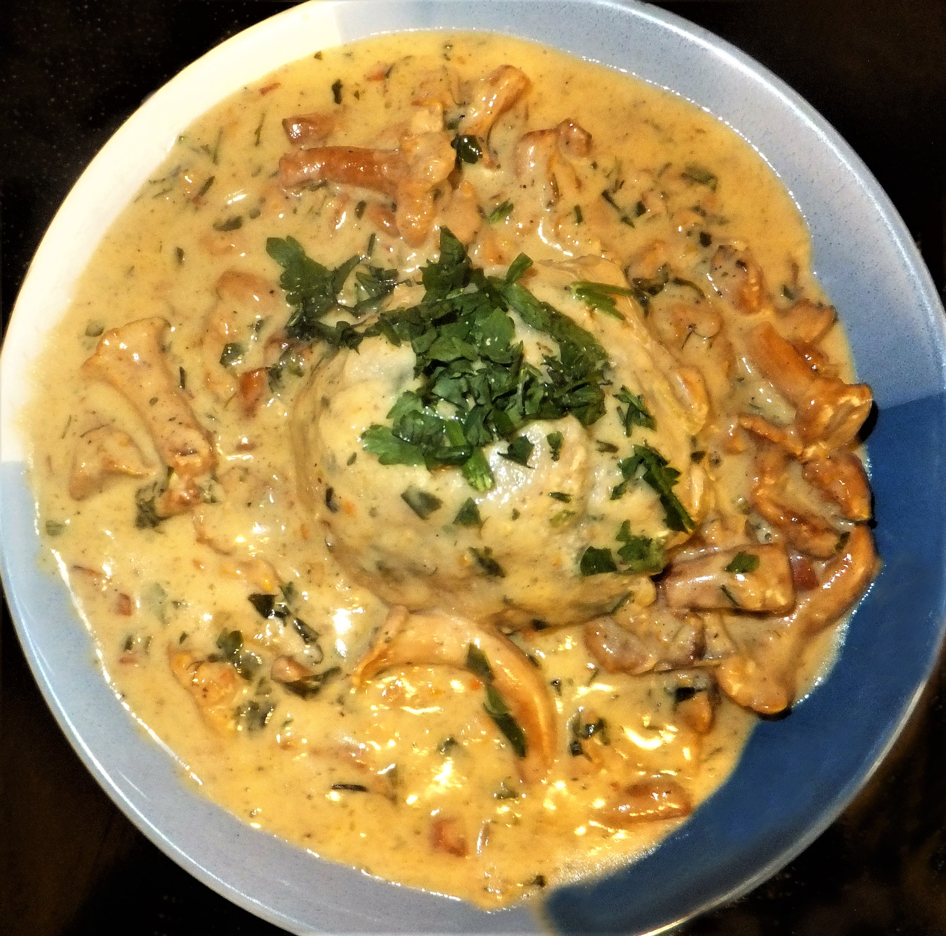 Rahmpfifferlinge mit Tiroler Semmelknödel